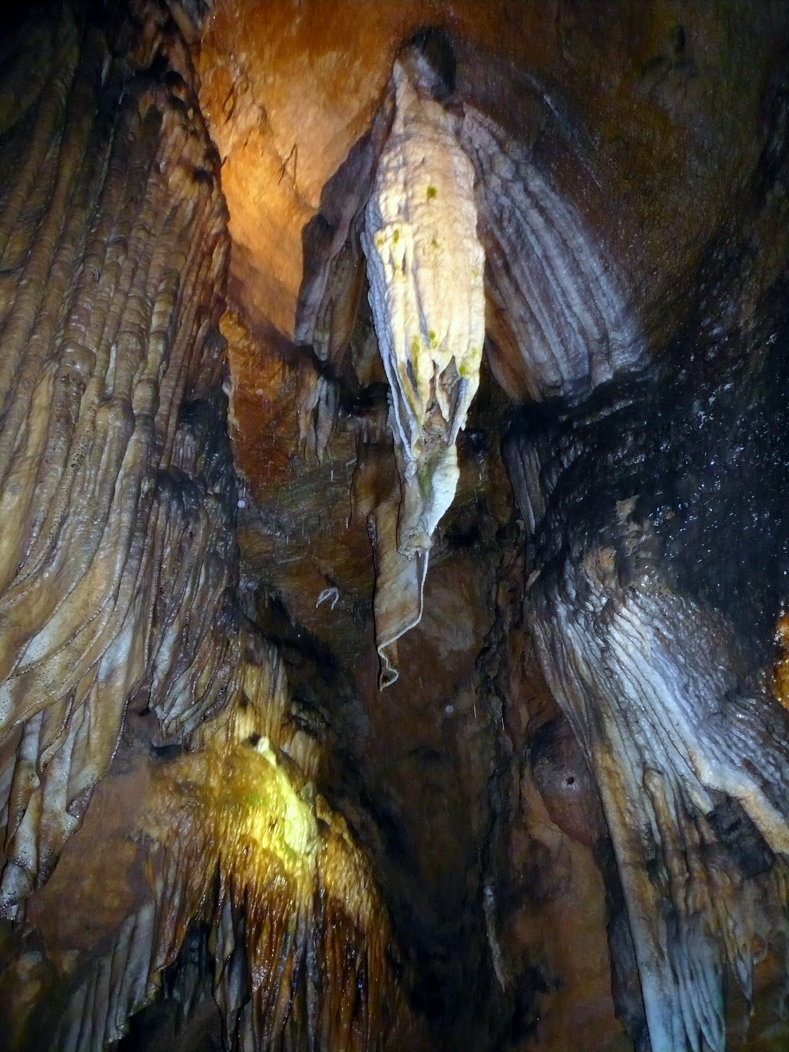 Sophienhöhle, Kronleuchter